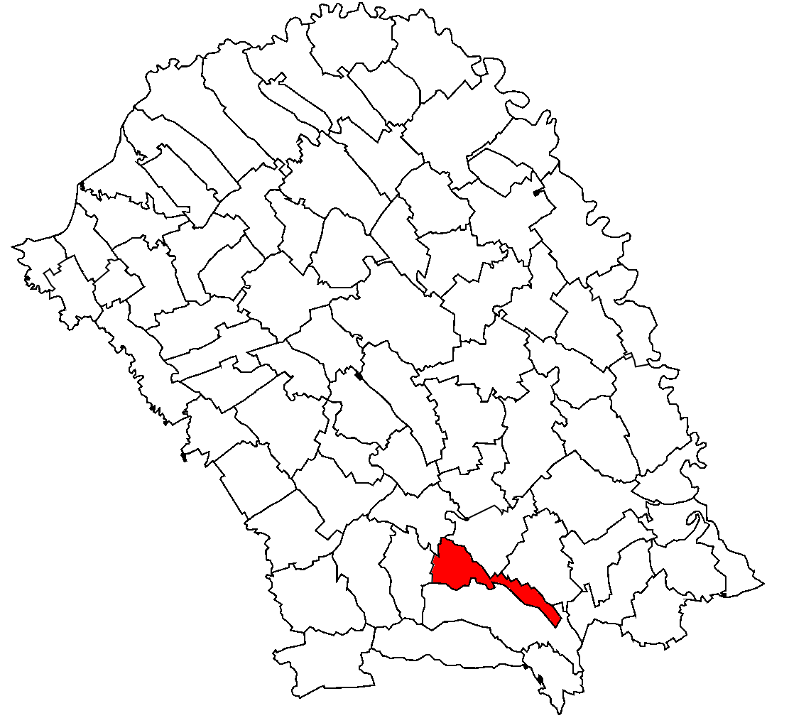 Categorie:Hărţi ale judeţului Botoşani